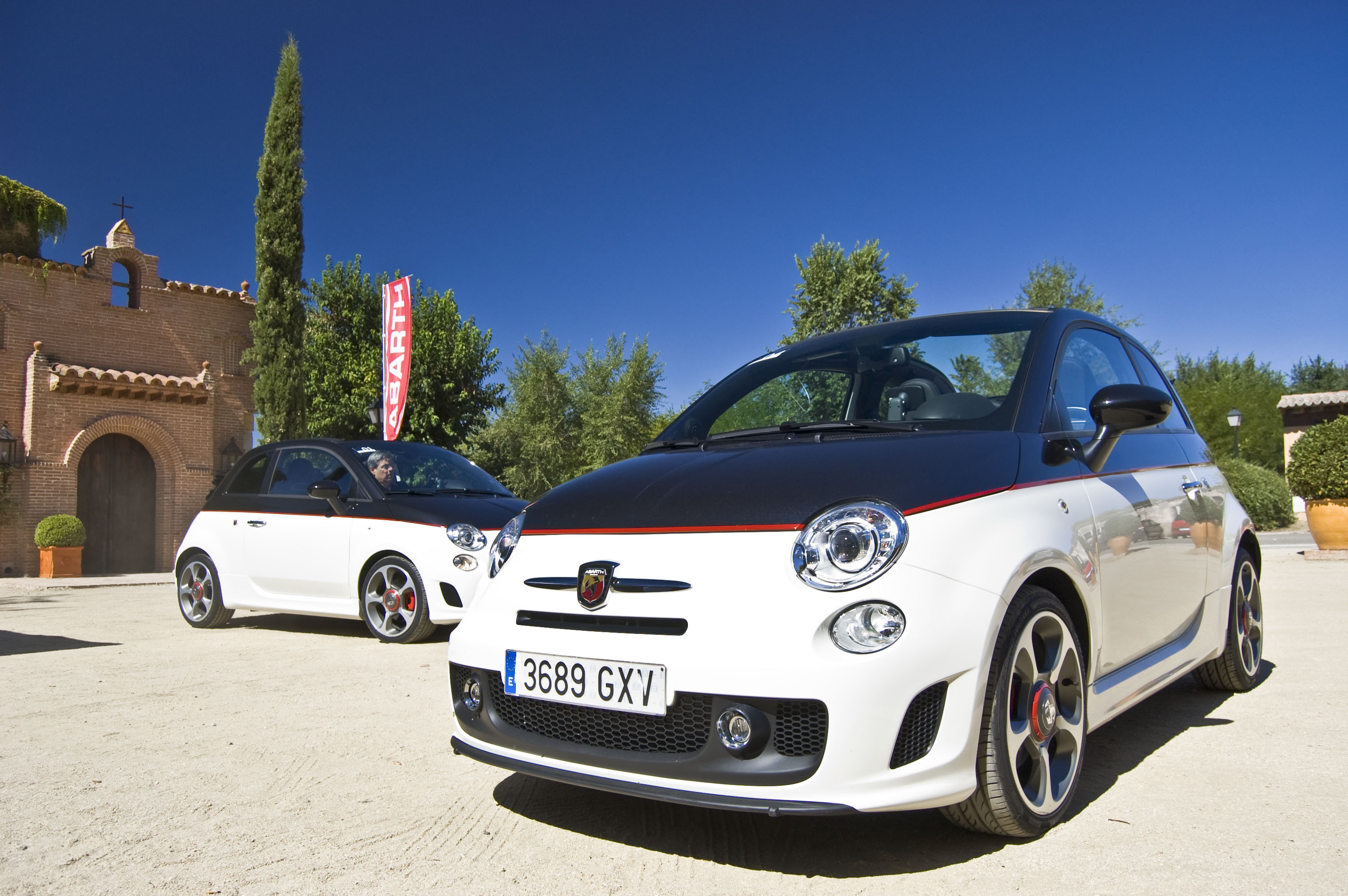 Prueba del Abarth 500C en Diariomotor